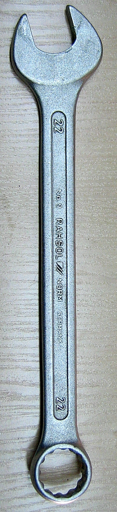 Lehtsilmusvõti